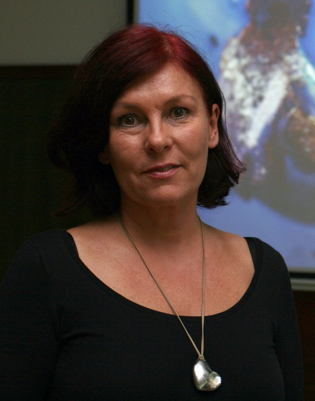 Miranda Rumina in 2010